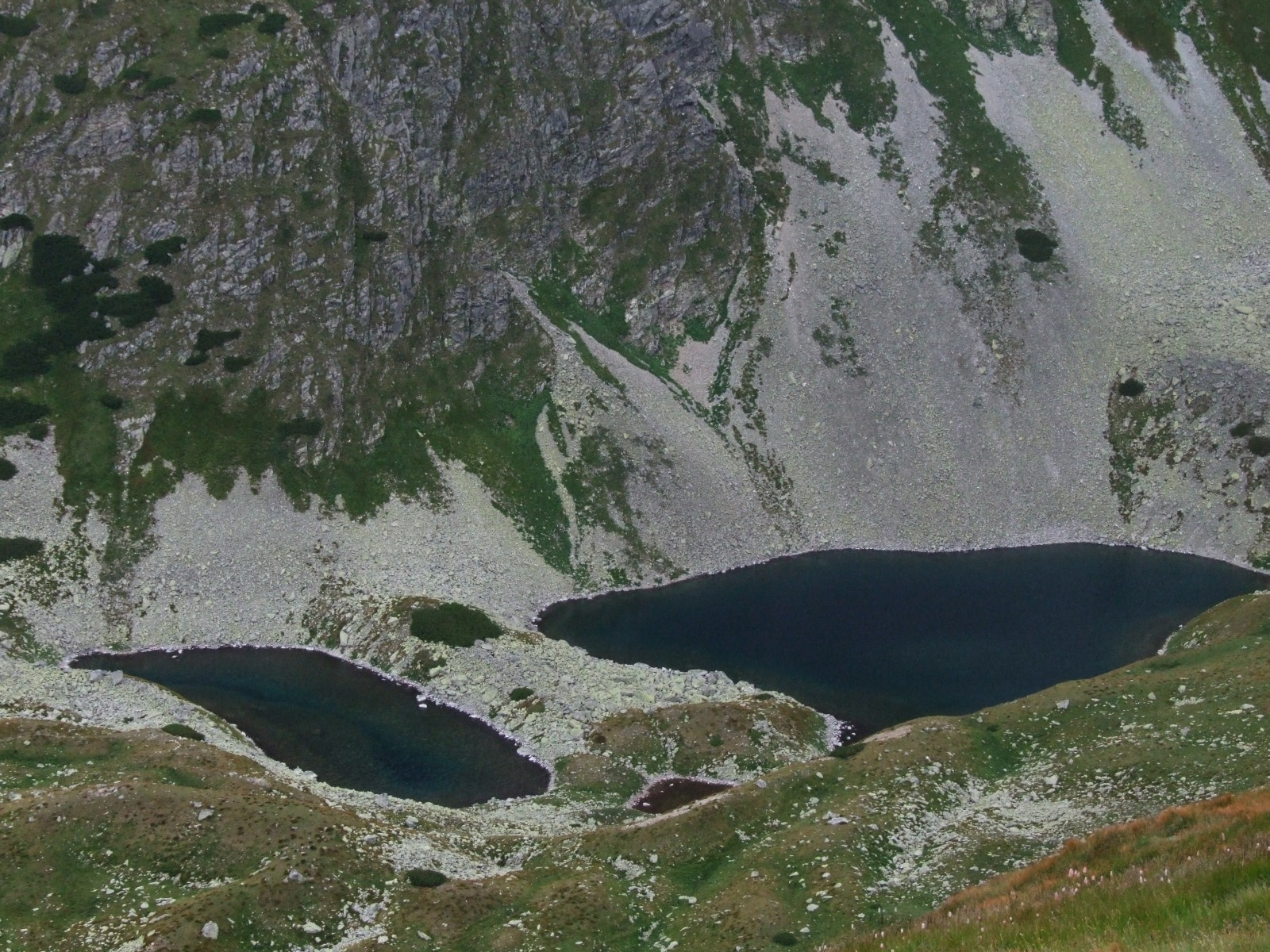 Stawy Bystre:Wielki, Długi, Mały (Tatry Zachodnie)